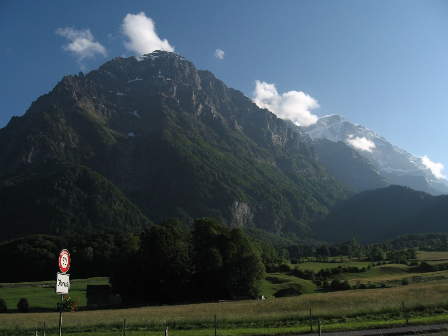 Vorderglärnisch mit Ortstafel Glarus, Blickrichtung Süden